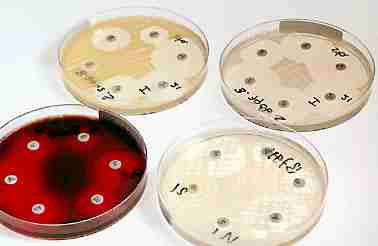 resistentiemeting op klassieke manier op voedingsbodems met disks geimpregneerd met antibiotica